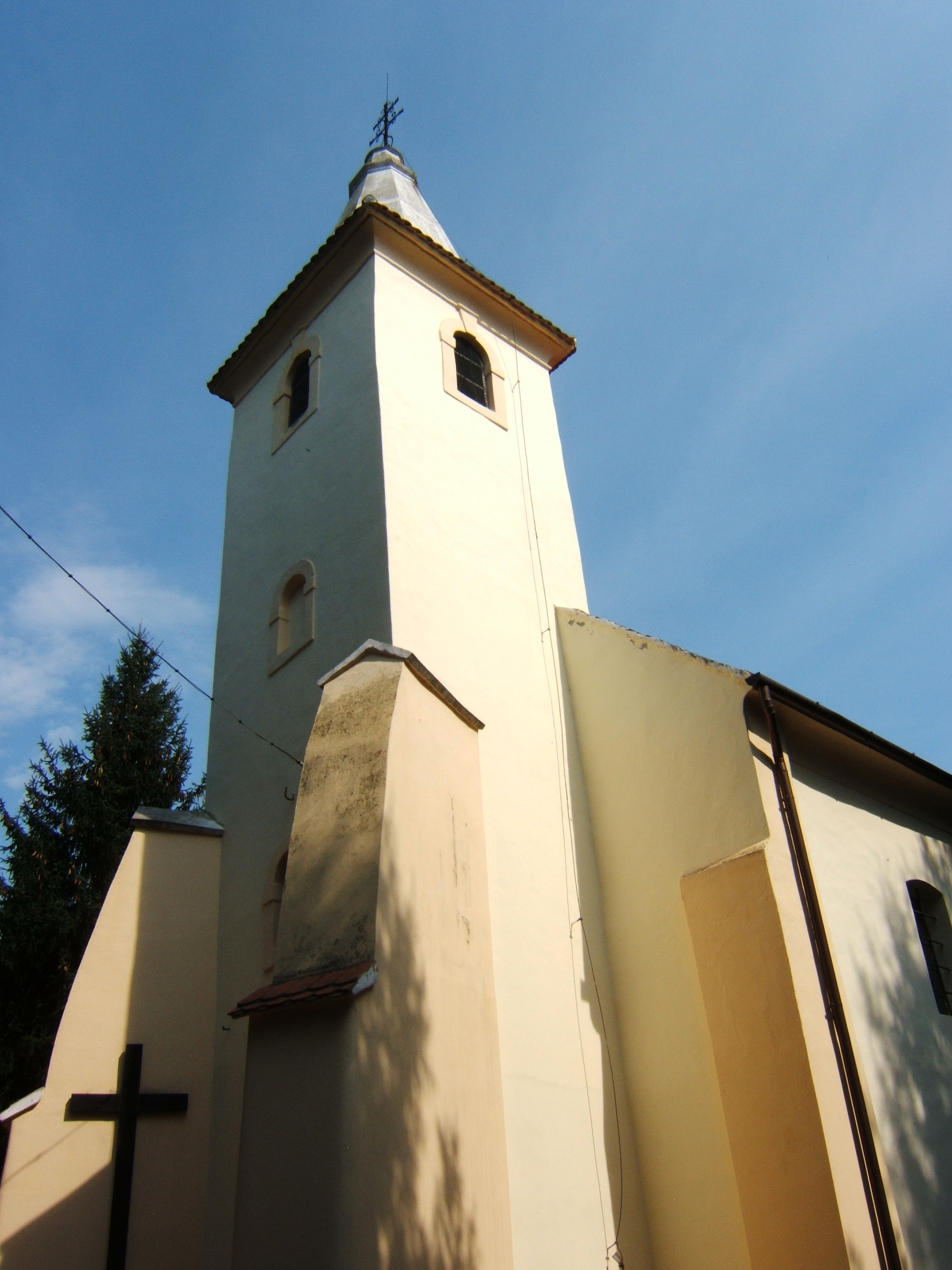 Gadány, templom